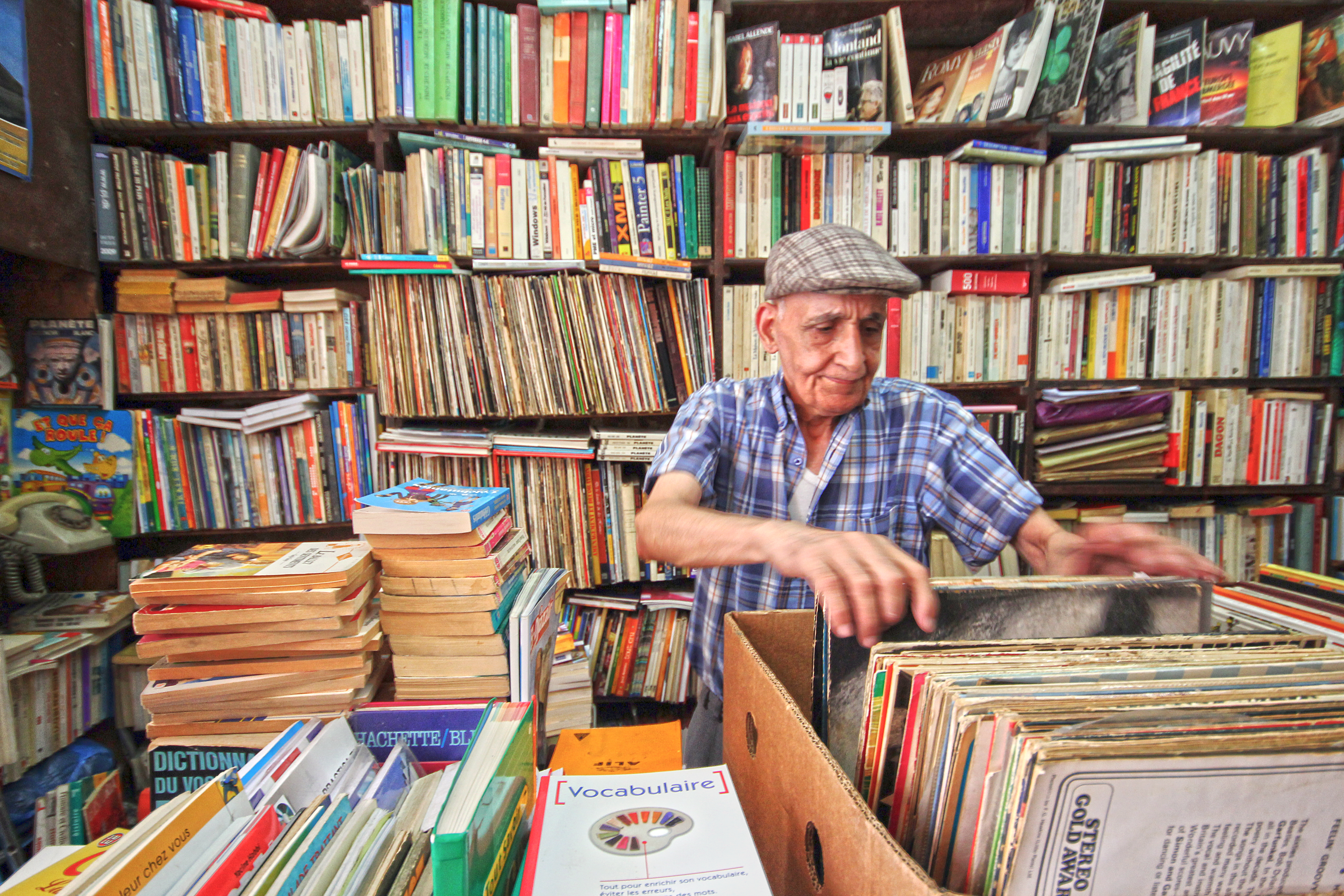 Libraire dans une librairie francophone d'Alger (Algérie).